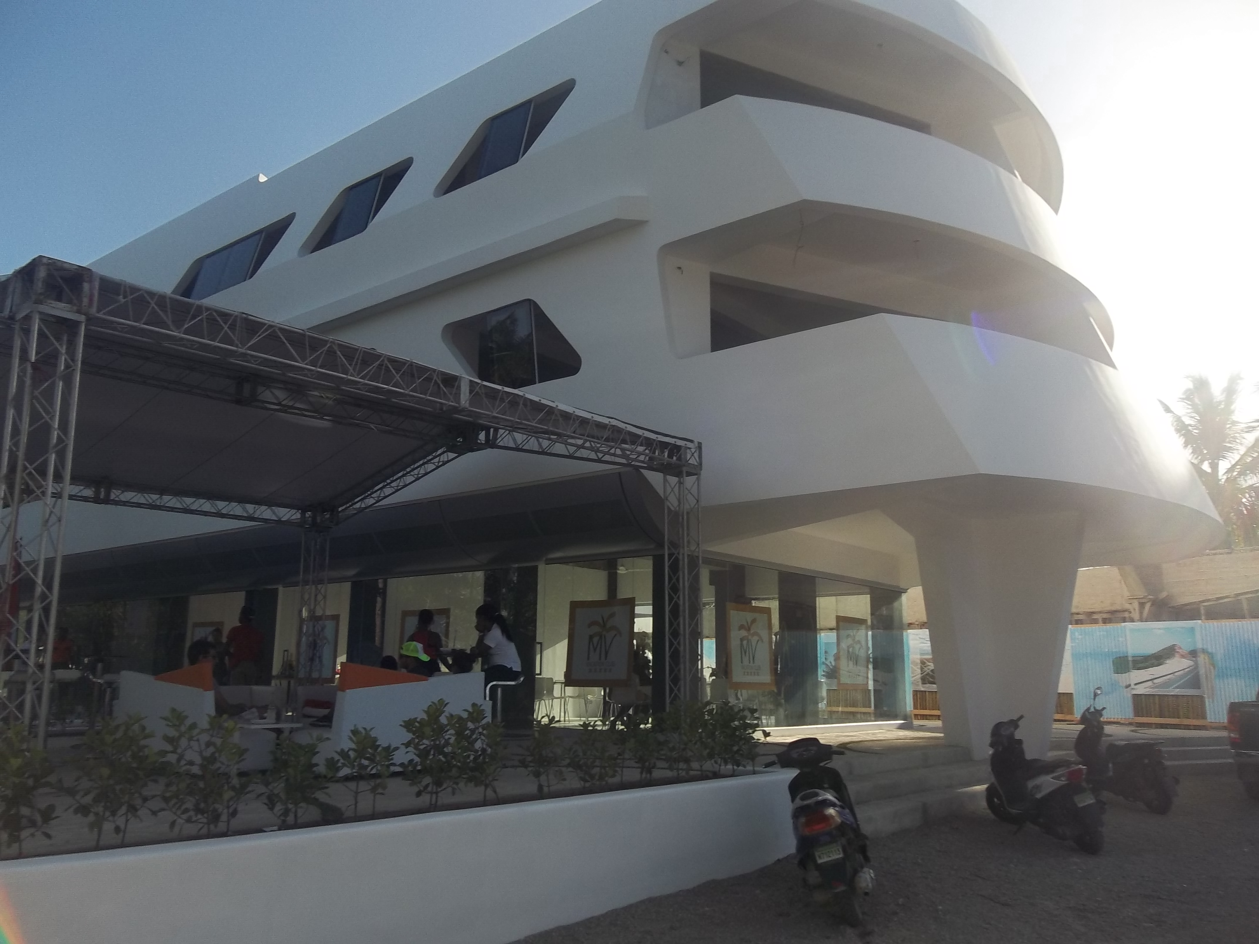 maravillosa plaza